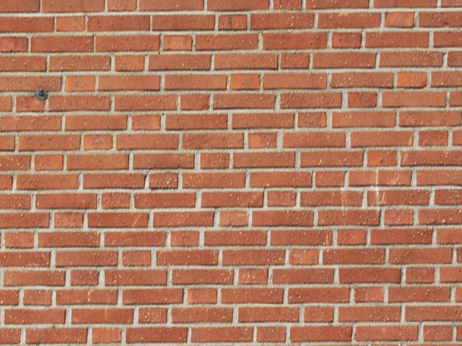 Arvika, Sweden. Gamla posten, brick wall.